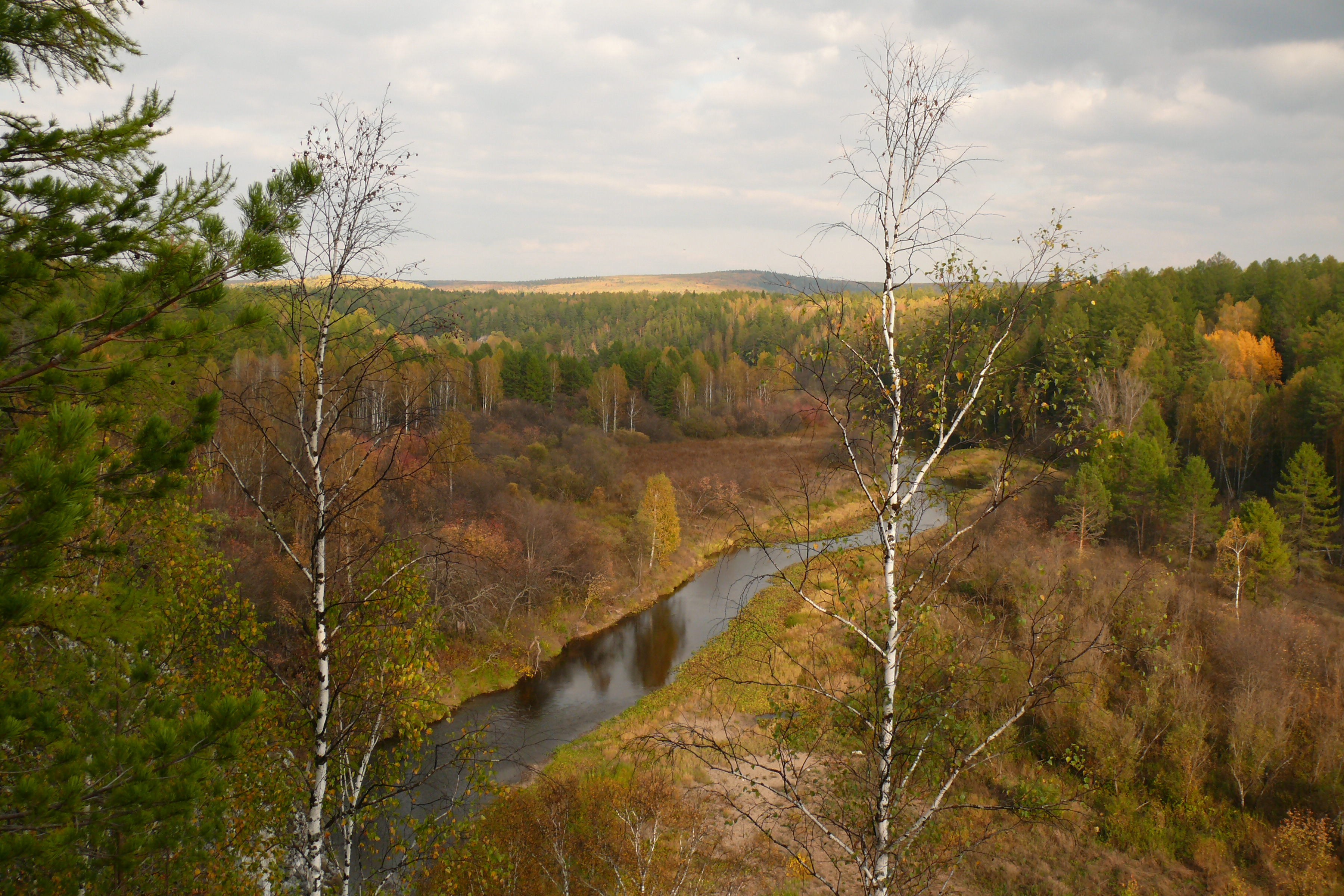 Оленьи ручьи, Нижнесергинский район This image is related to the protected area of Russia number 6610424